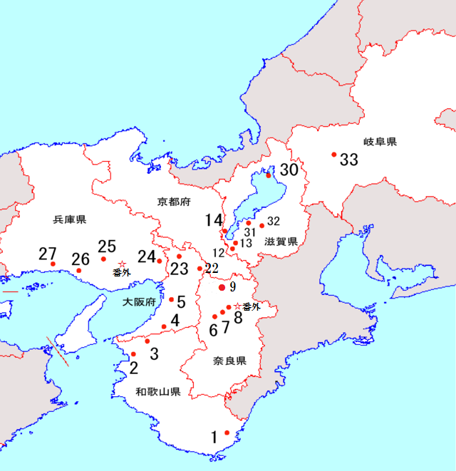 一部修正させていただきました（９と２２と番外）